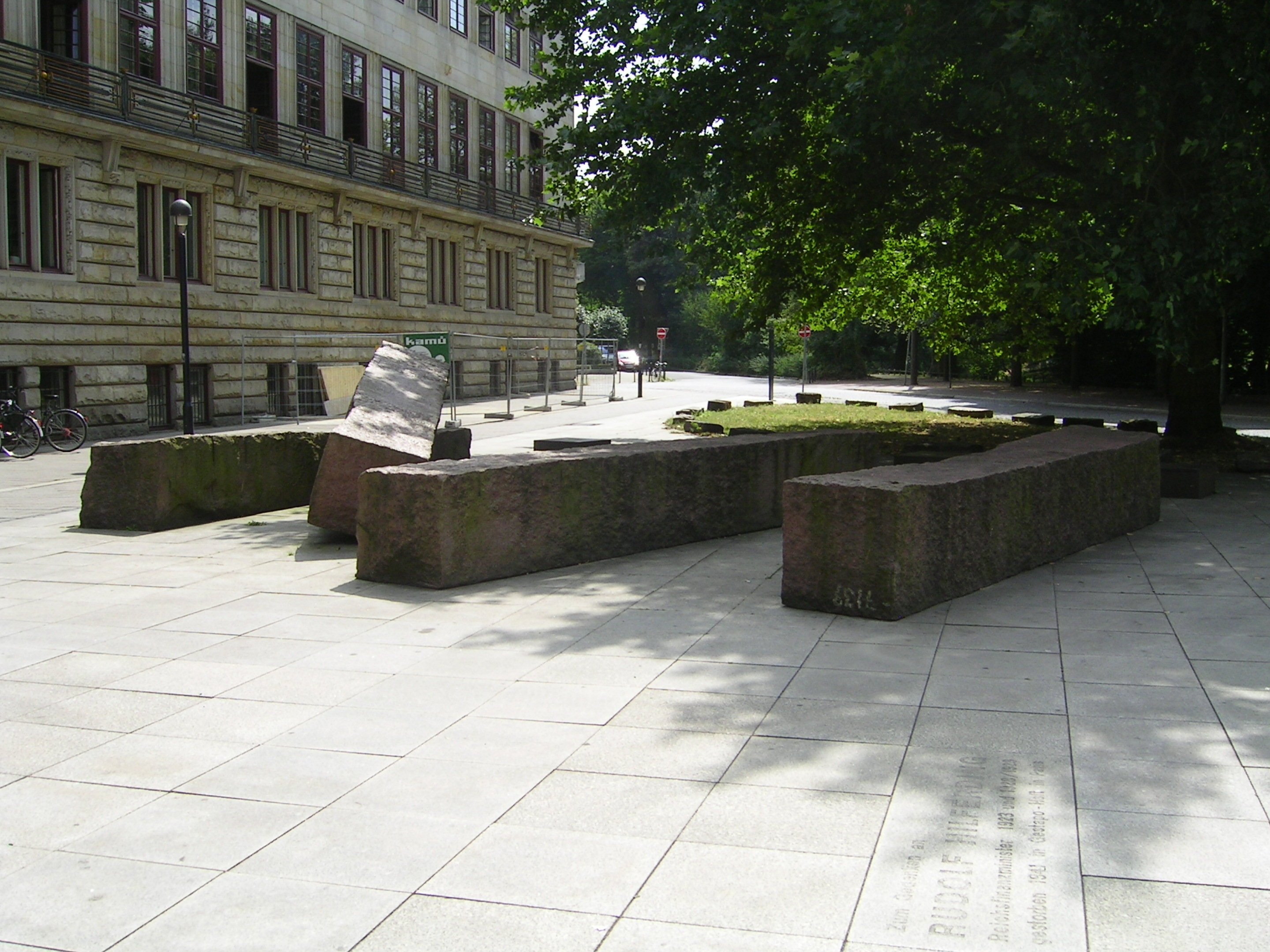 "der senator fur finanzen" building in Bremen City